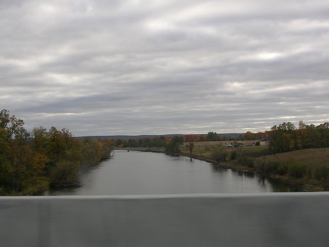 Mississippi River, Ontario